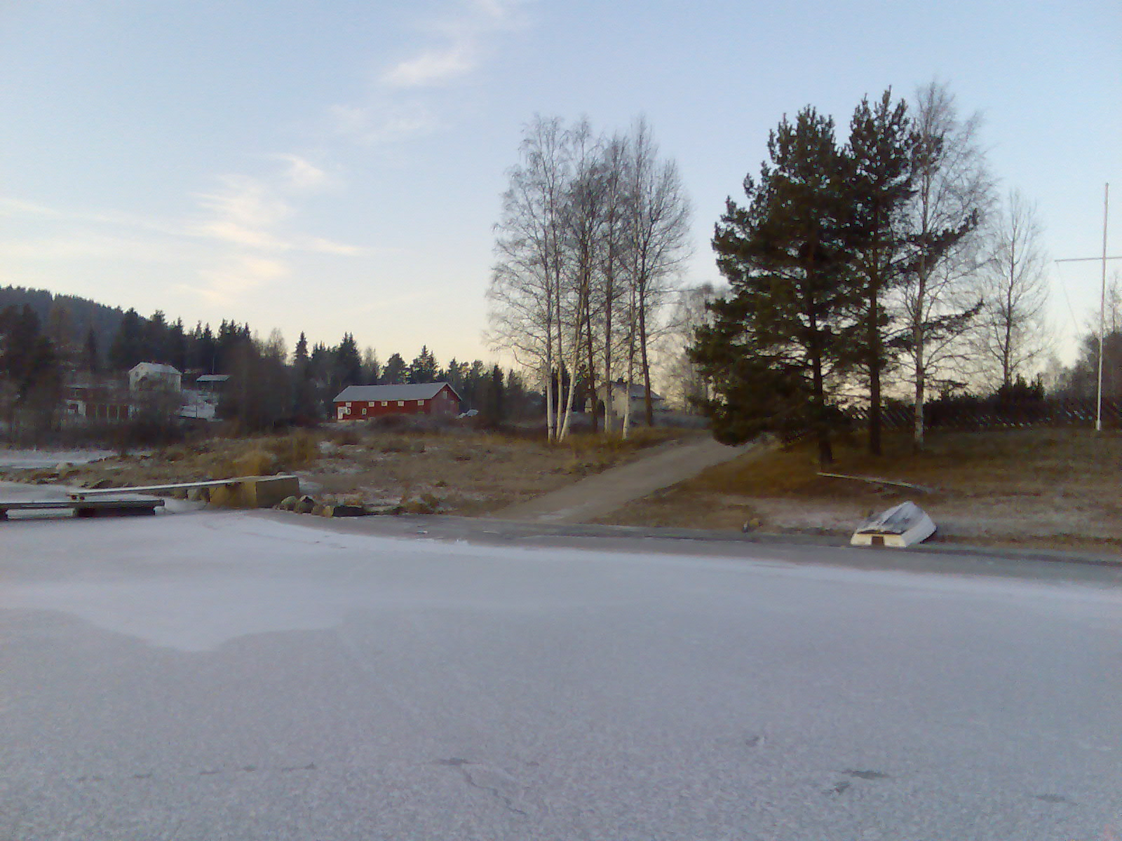 Utslippsrampe for fritidsbåt